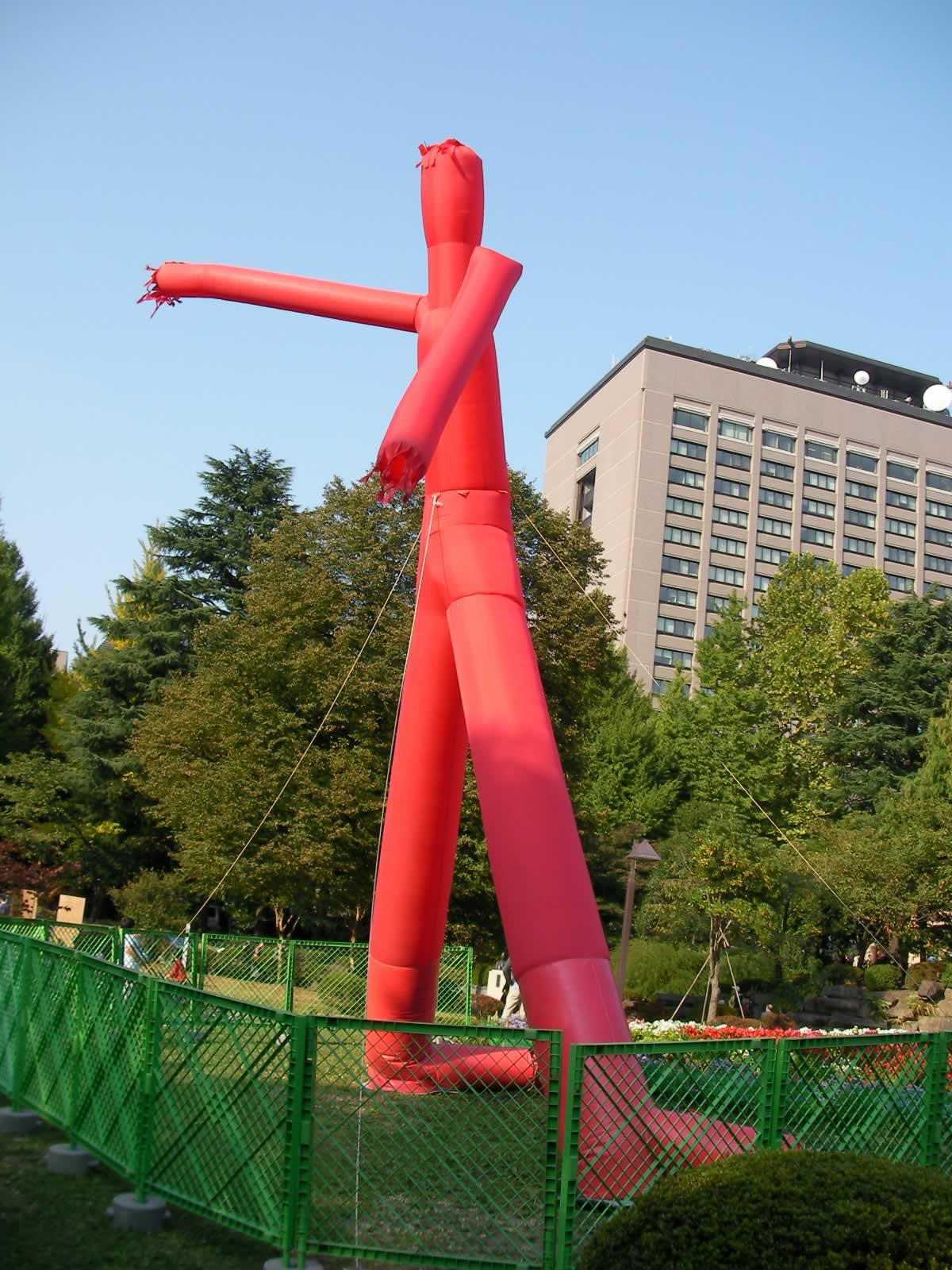 Sky-dancer, Japan